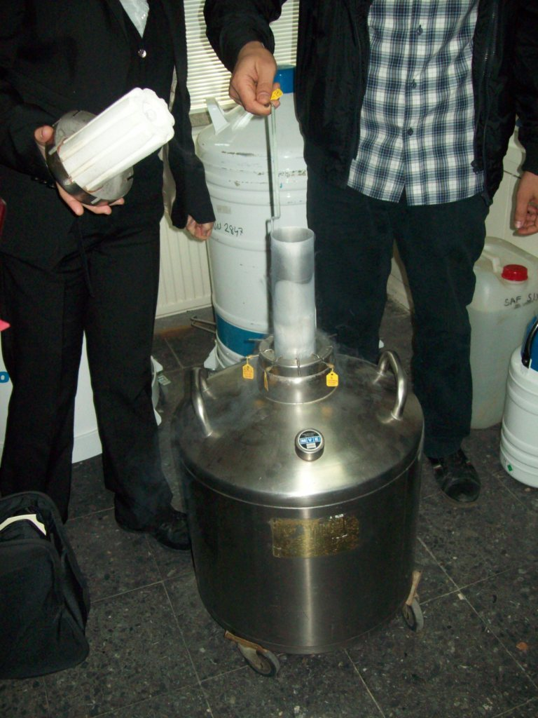 Сосуд (танк) для хранения вегетативно-размножаемых сельскохозяйственных и декоративных растений и их частей в жидком азоте